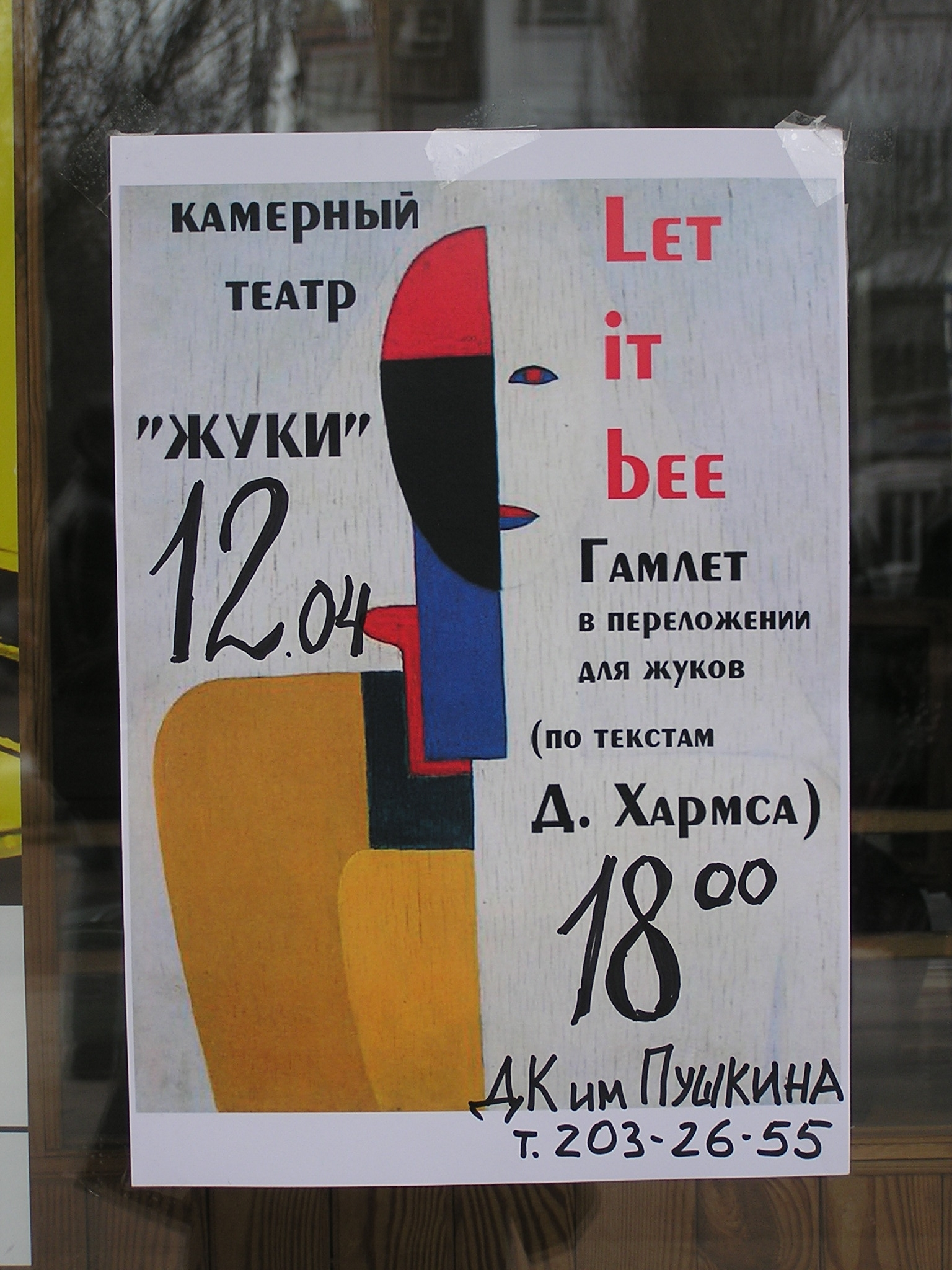 Афиша донецкого камерного театра «Жуки»